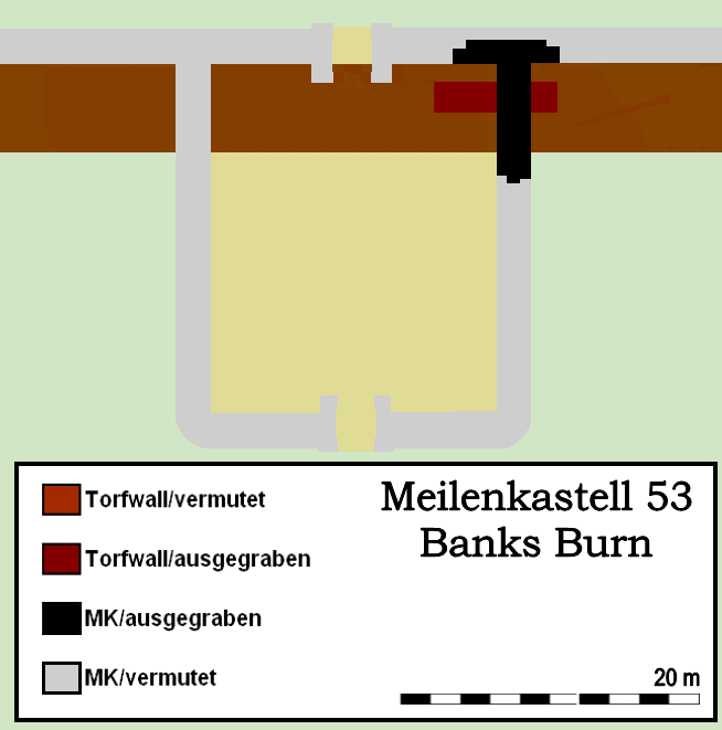 Befundskizze 1932 Meilenkastell 53 Banks Burn, Hadrianswall (GB).